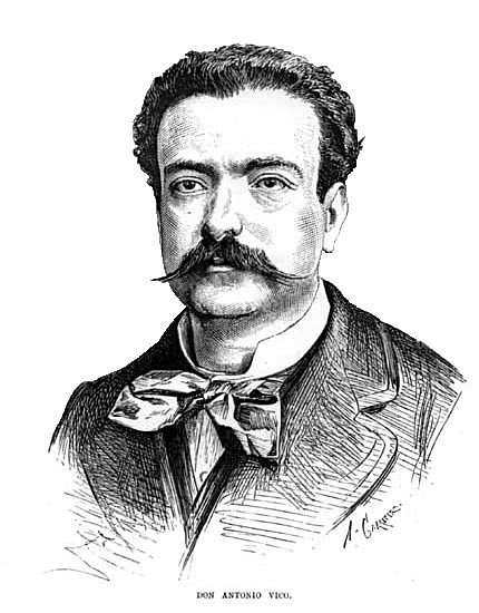 Grabado de A. Carretero en La Ilustración Española Y Americana